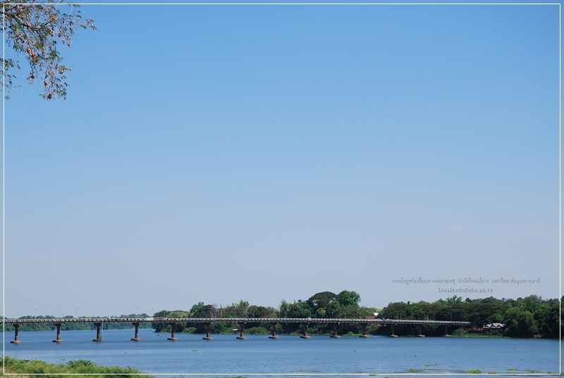 สะพานพิบูลมังสาหาร